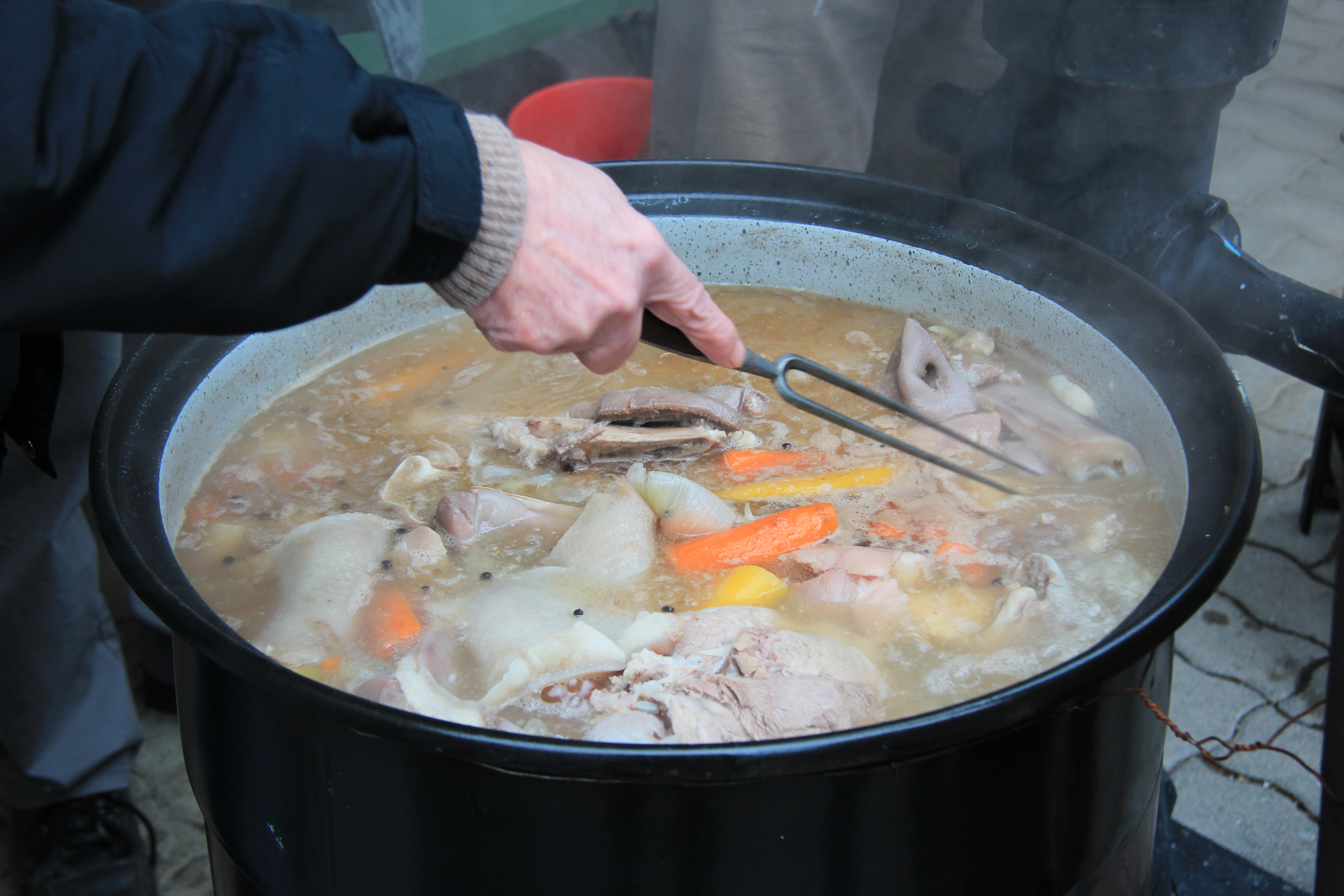 Kochen von Kesselfleisch mit Innereien und Sauschädel